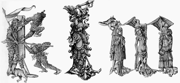 K, L and M, L.292, L.293, L.294